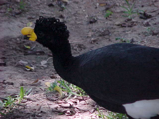 Foto del paujil culiblanco Crax daubentoni